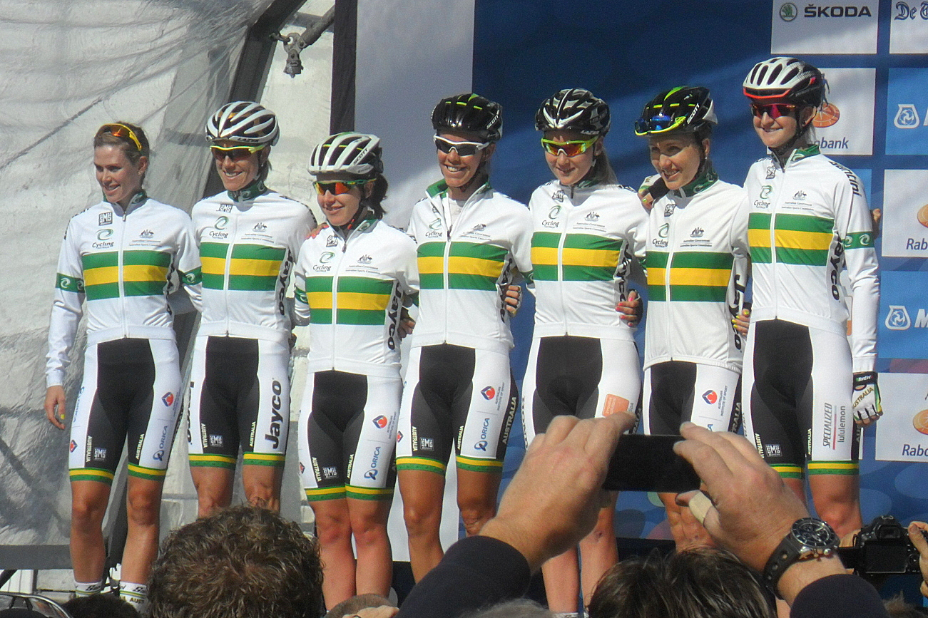 Ploegenpresentatie Australië voor de start van het Wereldkampioenschap 2012 in Valkenburg, Nederland.